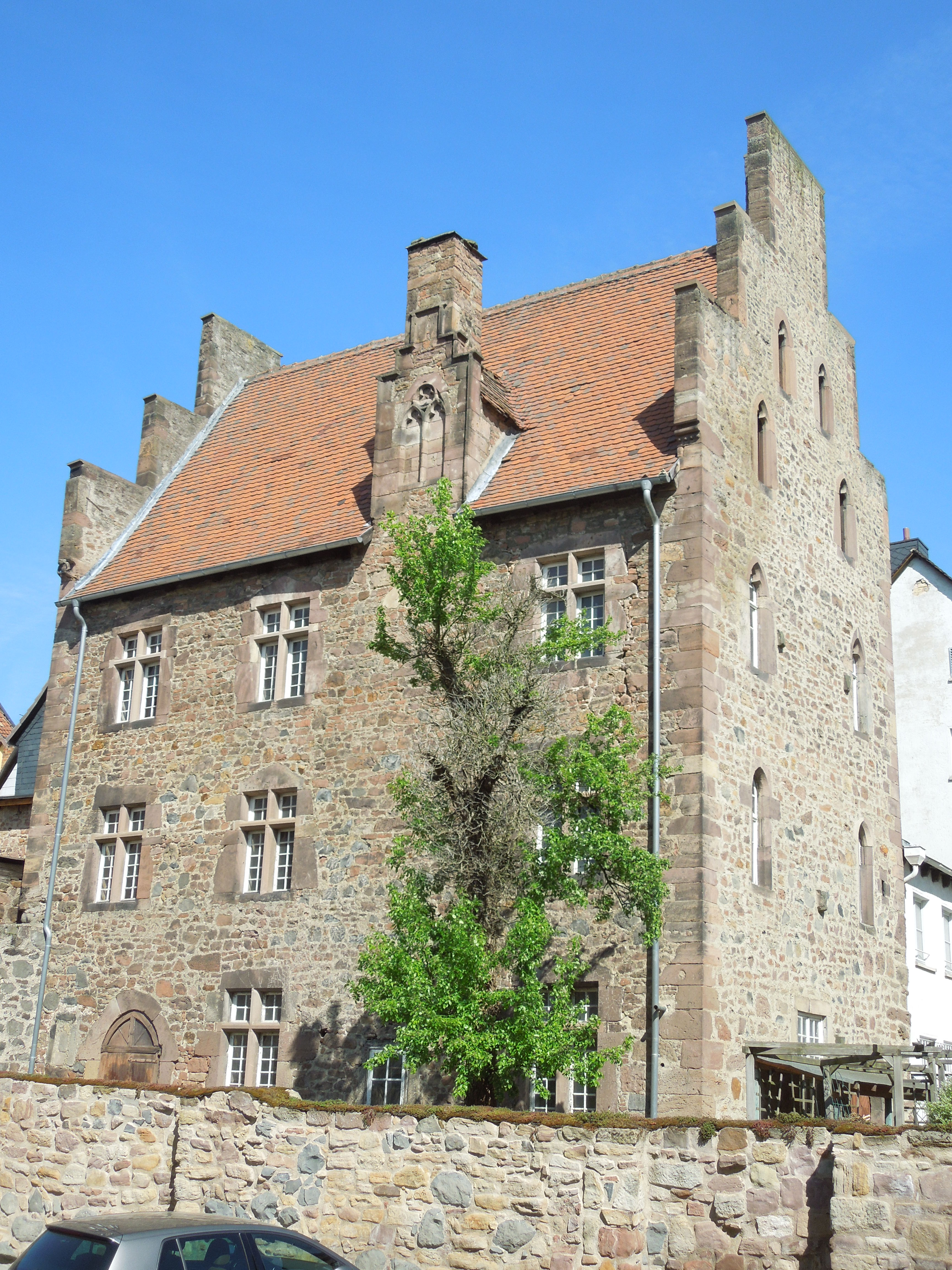 Die ehemalige "Kurie in der Fischgasse" in Fritzlar, zwischen Marktplatz und Dom, erbaut um 1410. Die gotische Kurie war eine von einst insgesamt 18 Kurien, Wohnhäusern der Chorherren, im Stiftsbezirk um den Dom. Das im Siebenjährigen Krieg zerstörte Dach wurde 1928 in seiner ursprünglichen Form mit Staffelgiebeln wieder hergestellt.